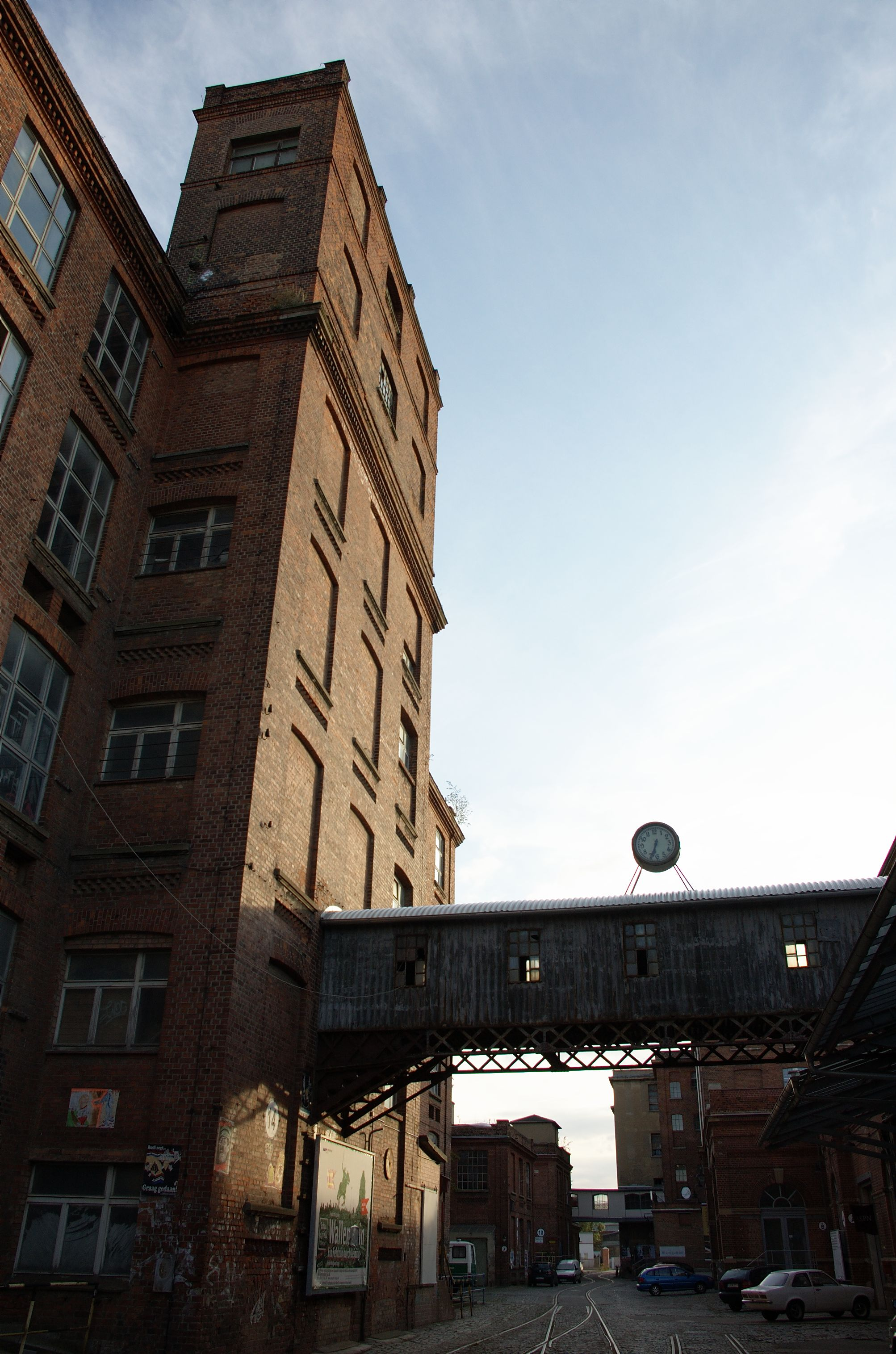 Das Gelände der alten Baumwollspinnerei in Leipzig-Lindenau